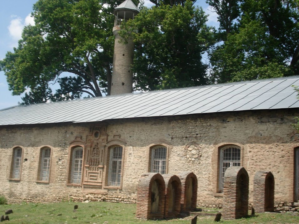 Şəki Xan məscidi və Xan qəbristanlığı